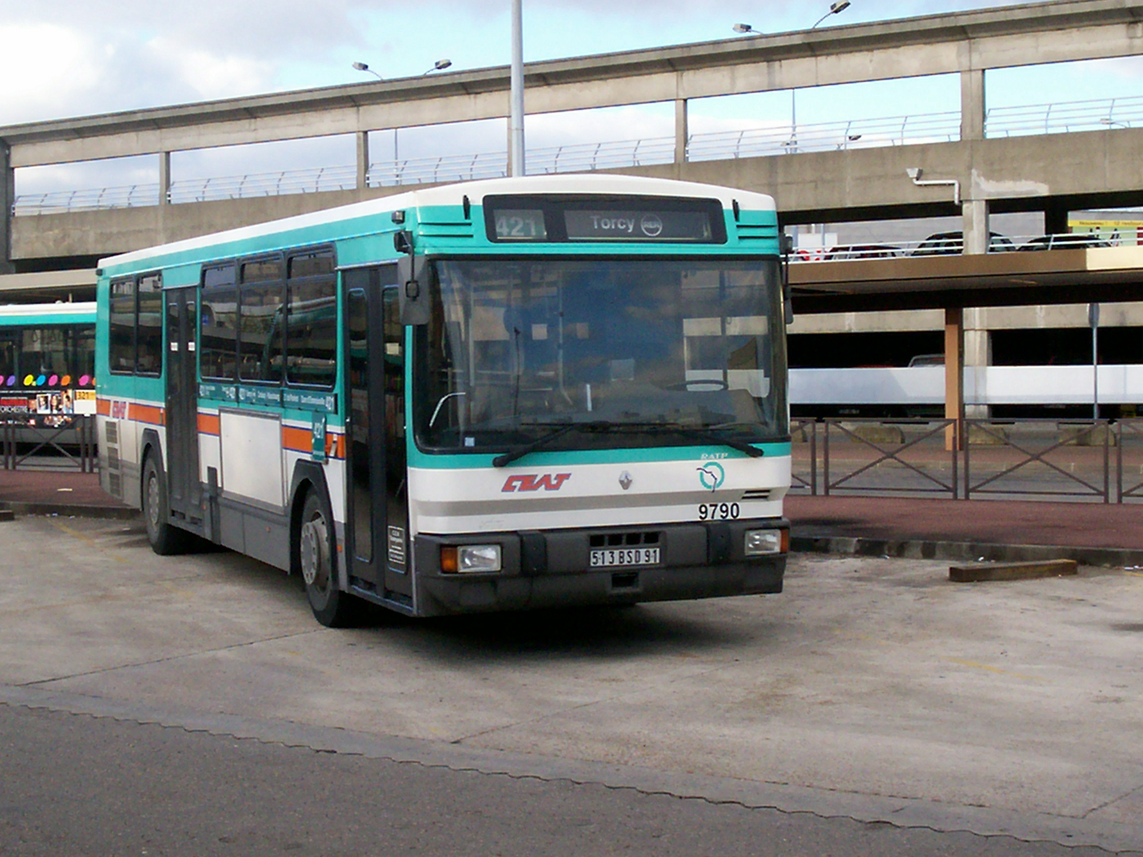 Bus de la ligne 421 garé au dépôt de la gare de Torcy.